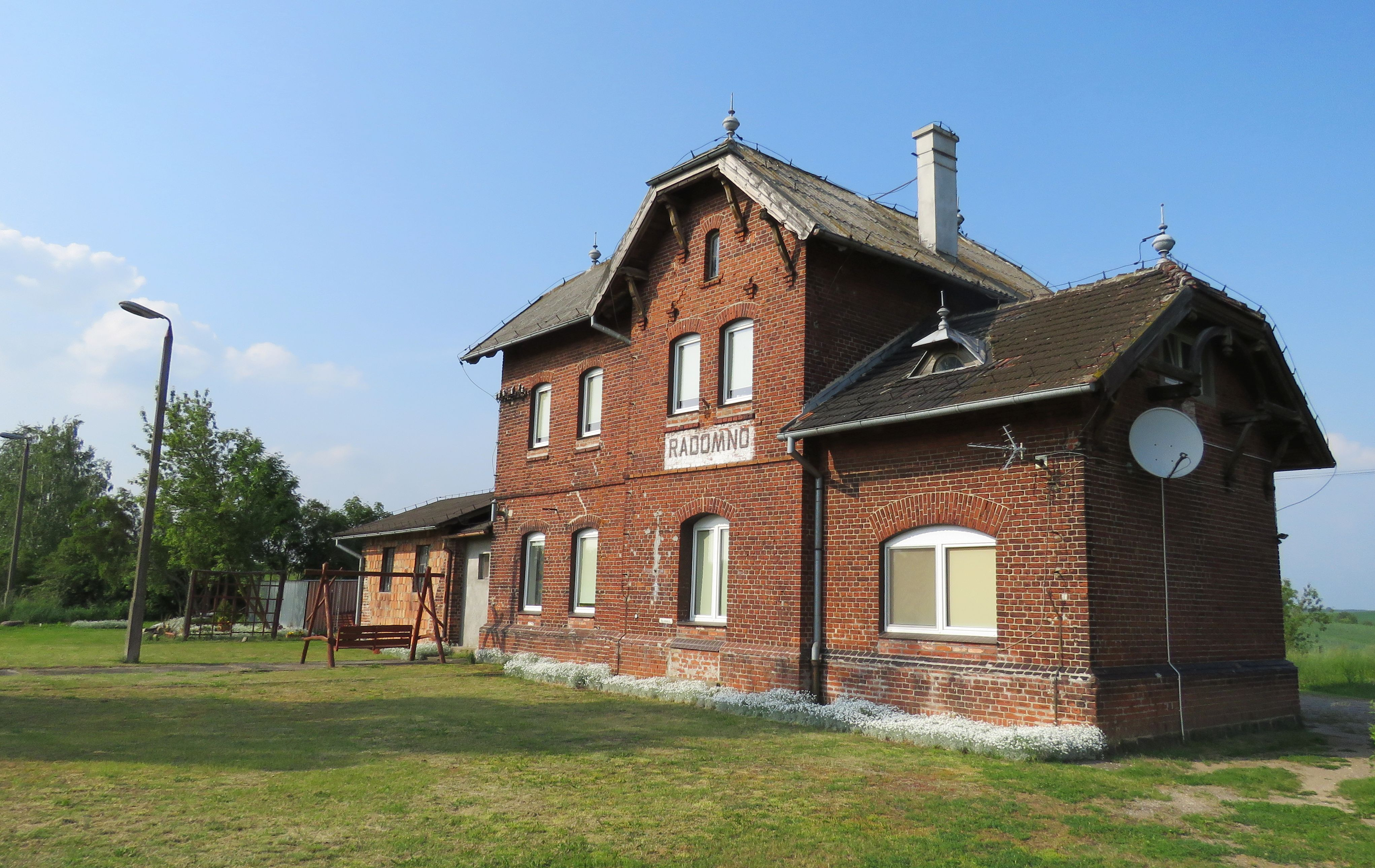 Radomno. Zamknięty przystanek kolejowy.